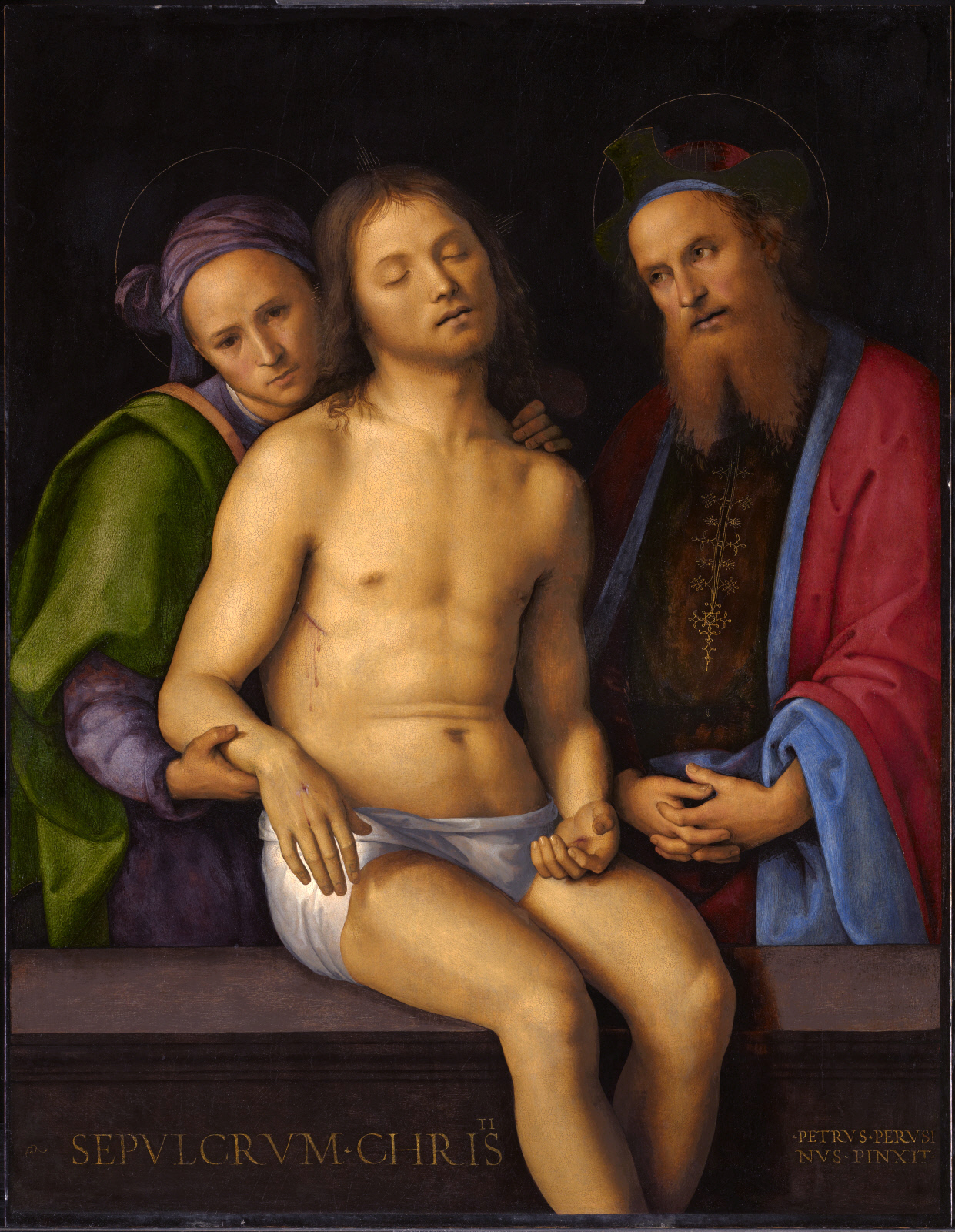 Pietro Perugino: Pietà con Nicodemo e Giuseppe d’Arimatea., Oil with tempera on panel, transferred to fabric on panel, 92.6 x 71.8 cm